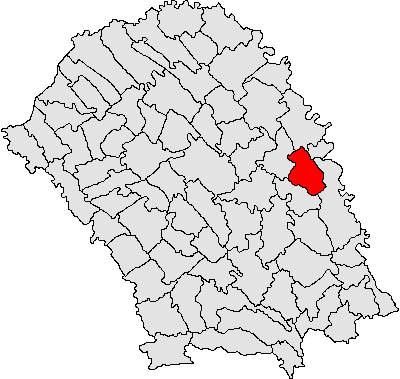 Categorie:Hărţi ale judeţului Botoşani